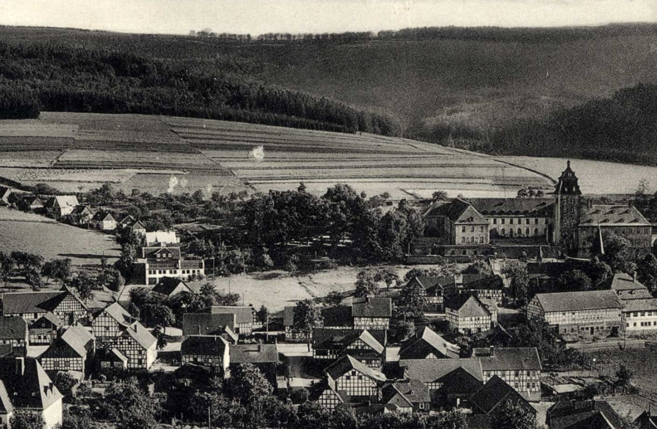 Grafschaft im Sauerland (Germany/NRW), Anno 1903